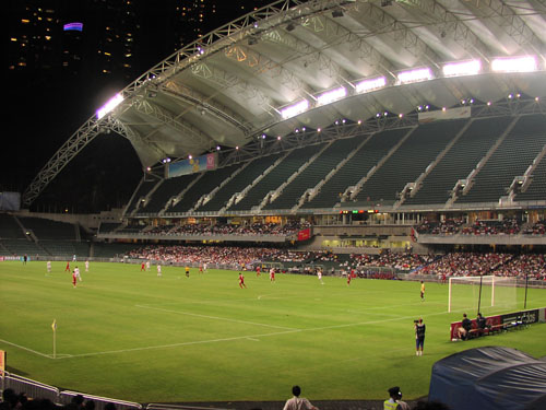 香港大球場，自行拍攝 (2006.8)